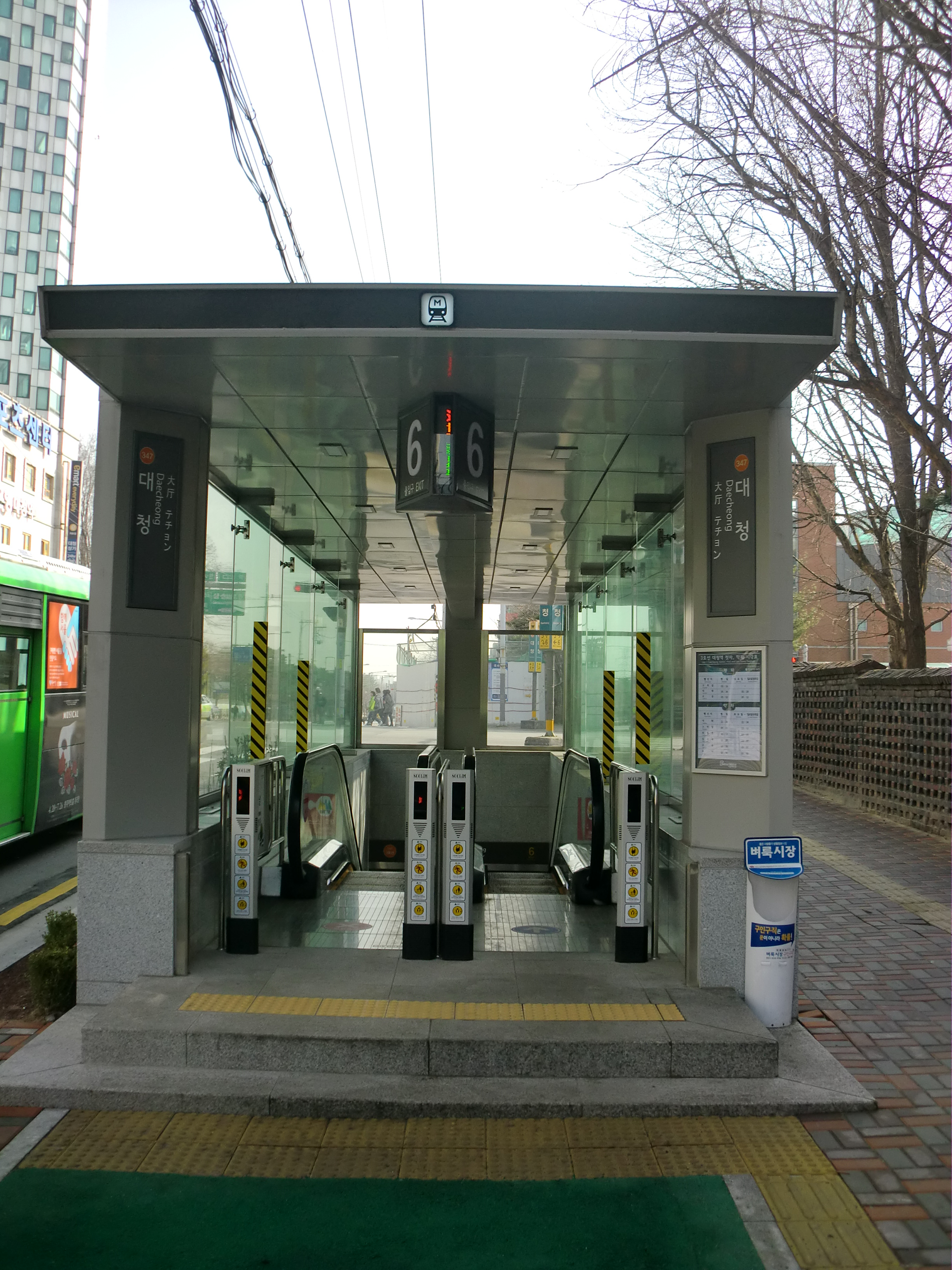 서울메트로 3호선 대청역 6번출구